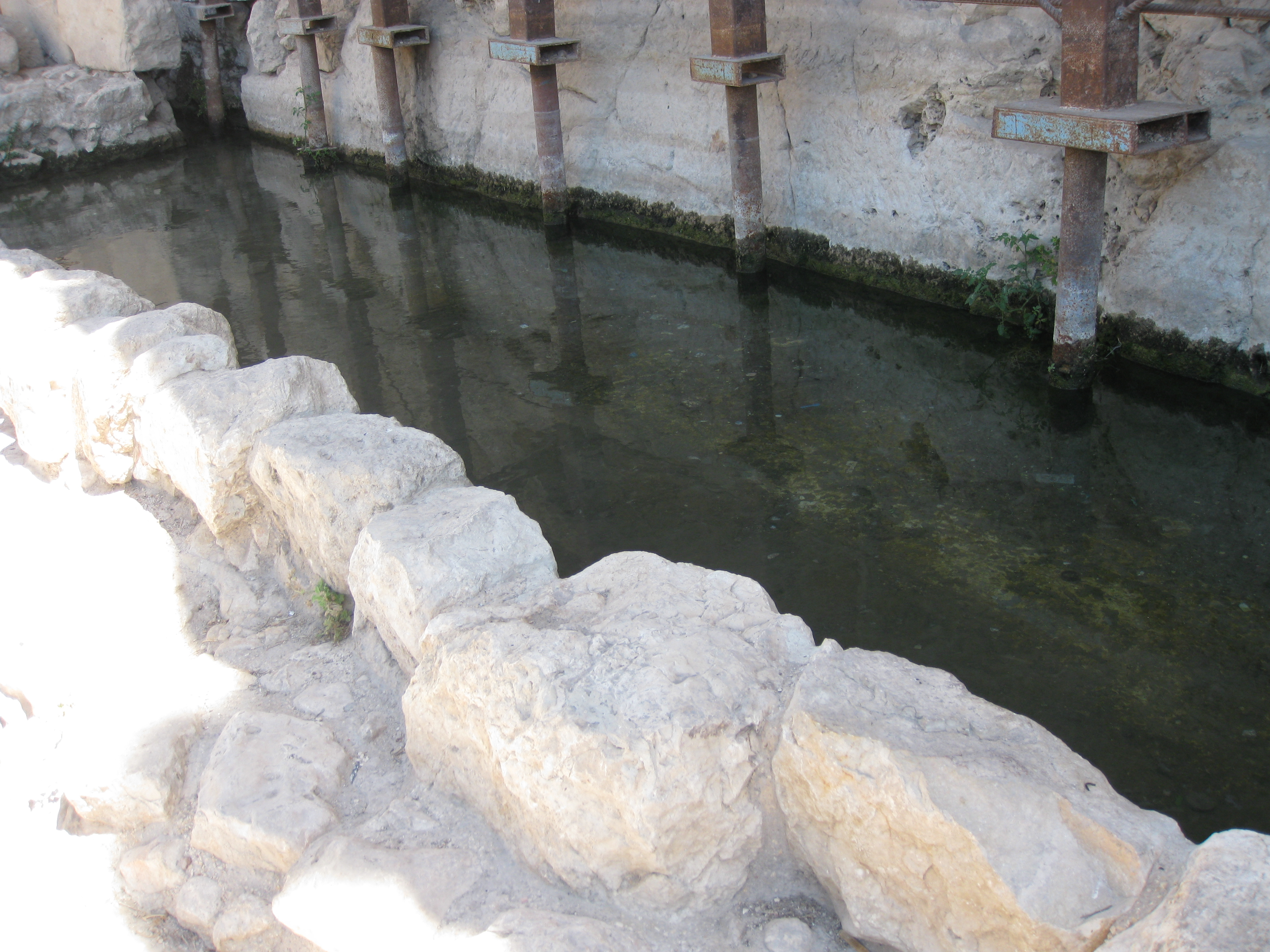 Pool of Siloam בריכת השילוח Second temple period pool התעלה מתקופת הבית השני אשר הובילה מים לבריכה